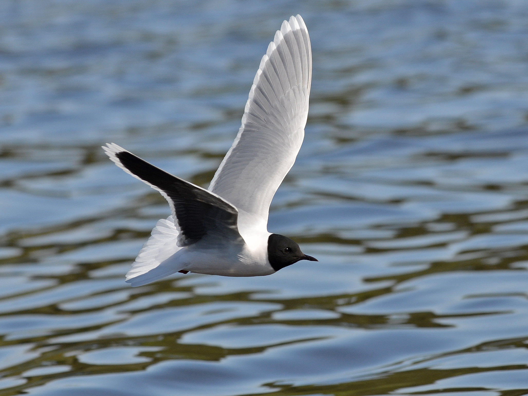 Little Gull Hydrocoloeus minutus, adult summer, Saint Petersburg, Russia